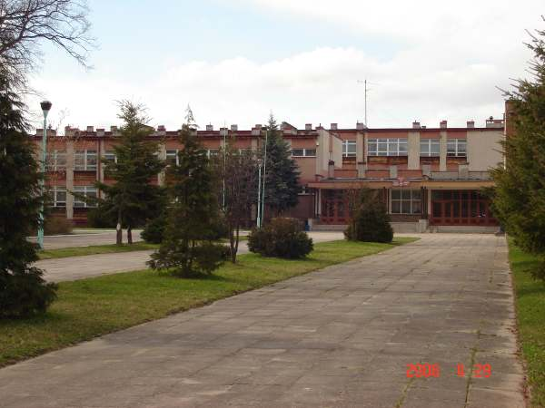 Nowa szkoła w Redle